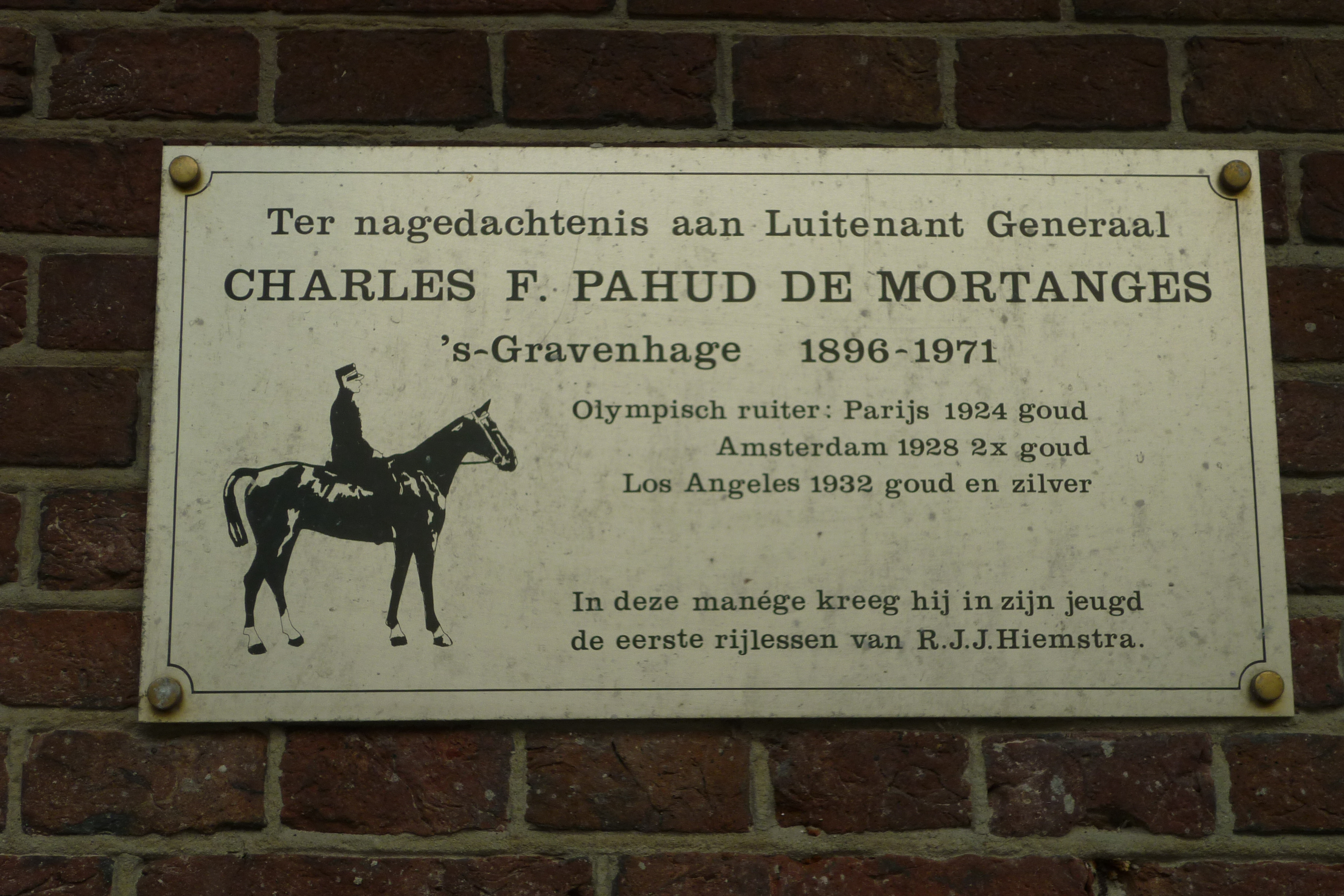 Haagsche Stadsrijschool, plaque ter nagedachtenis aan Charles Pahud de Mortanges